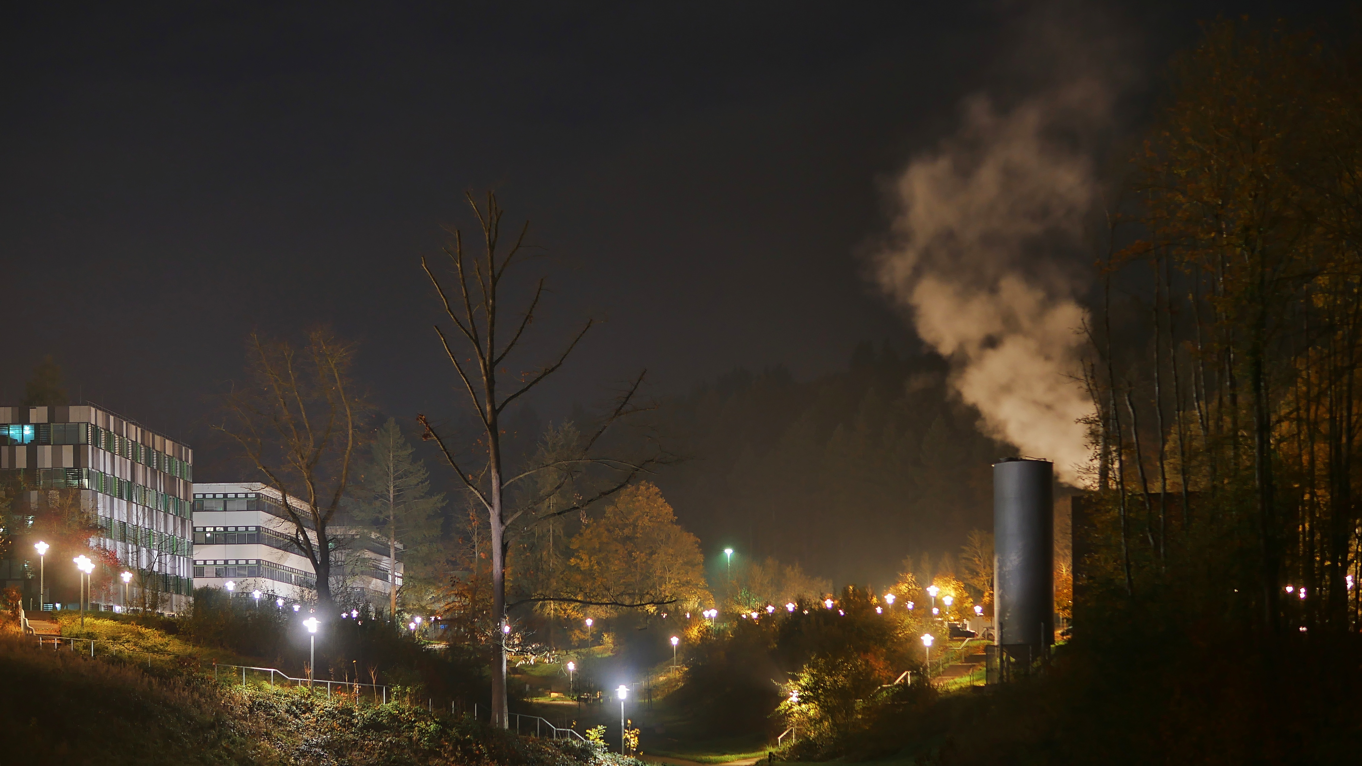 Hochschule Trier - Hauptkampus Schneidershof und Holzhackschnitzelheizwerk von Norden